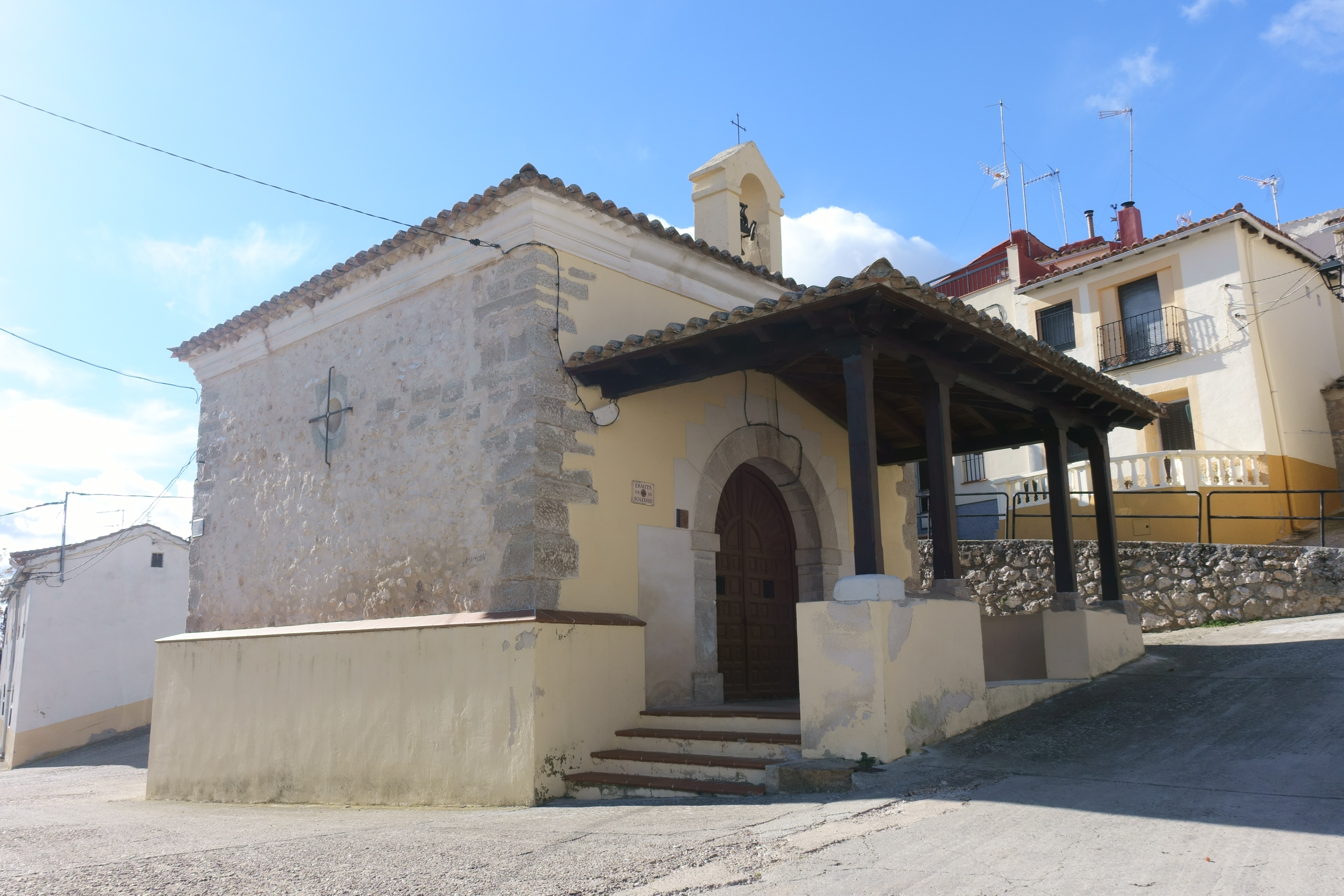 Ermita de la Soledad, en Cendejas de la Torre (Guadalajara, España).